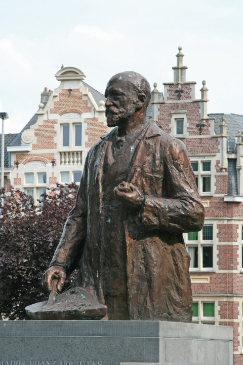 Alfred Courtens, monument à Franz Courtens, Dendermonde